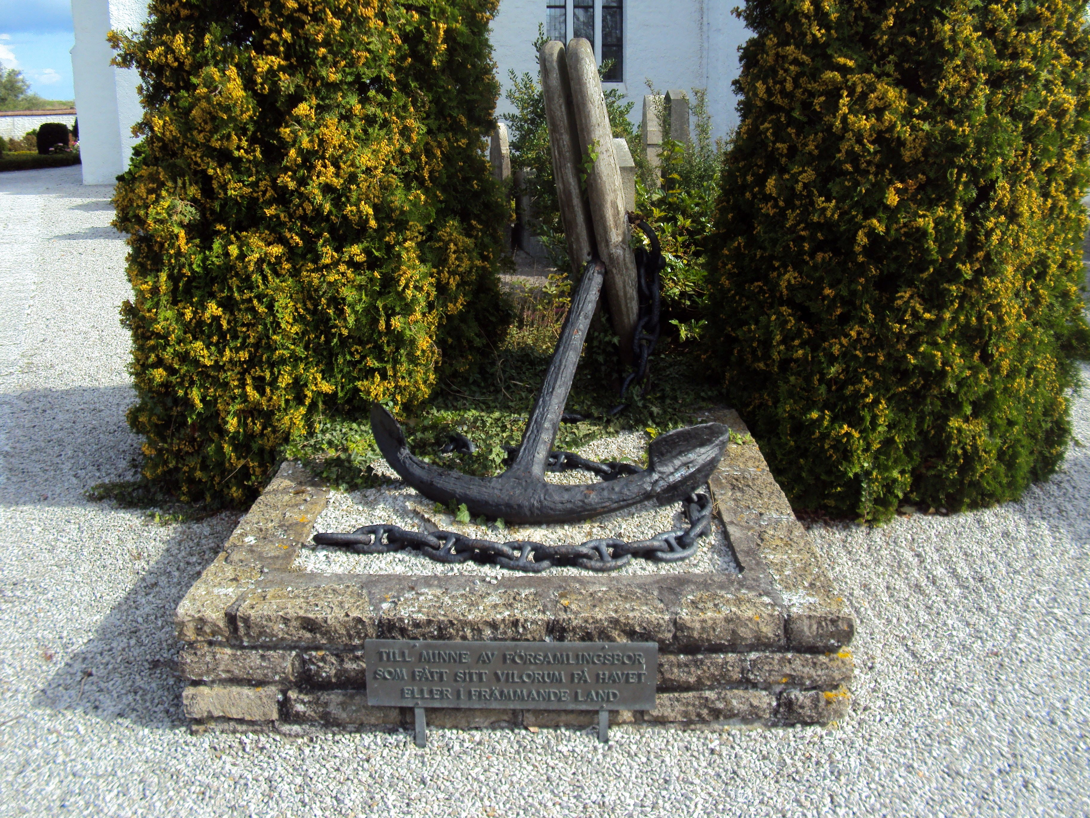 Ankare på Skanörs kyrkogård Texten lyder: "Till minne av församlingsbor som fått sitt vilorum på havet eller i främmande land"